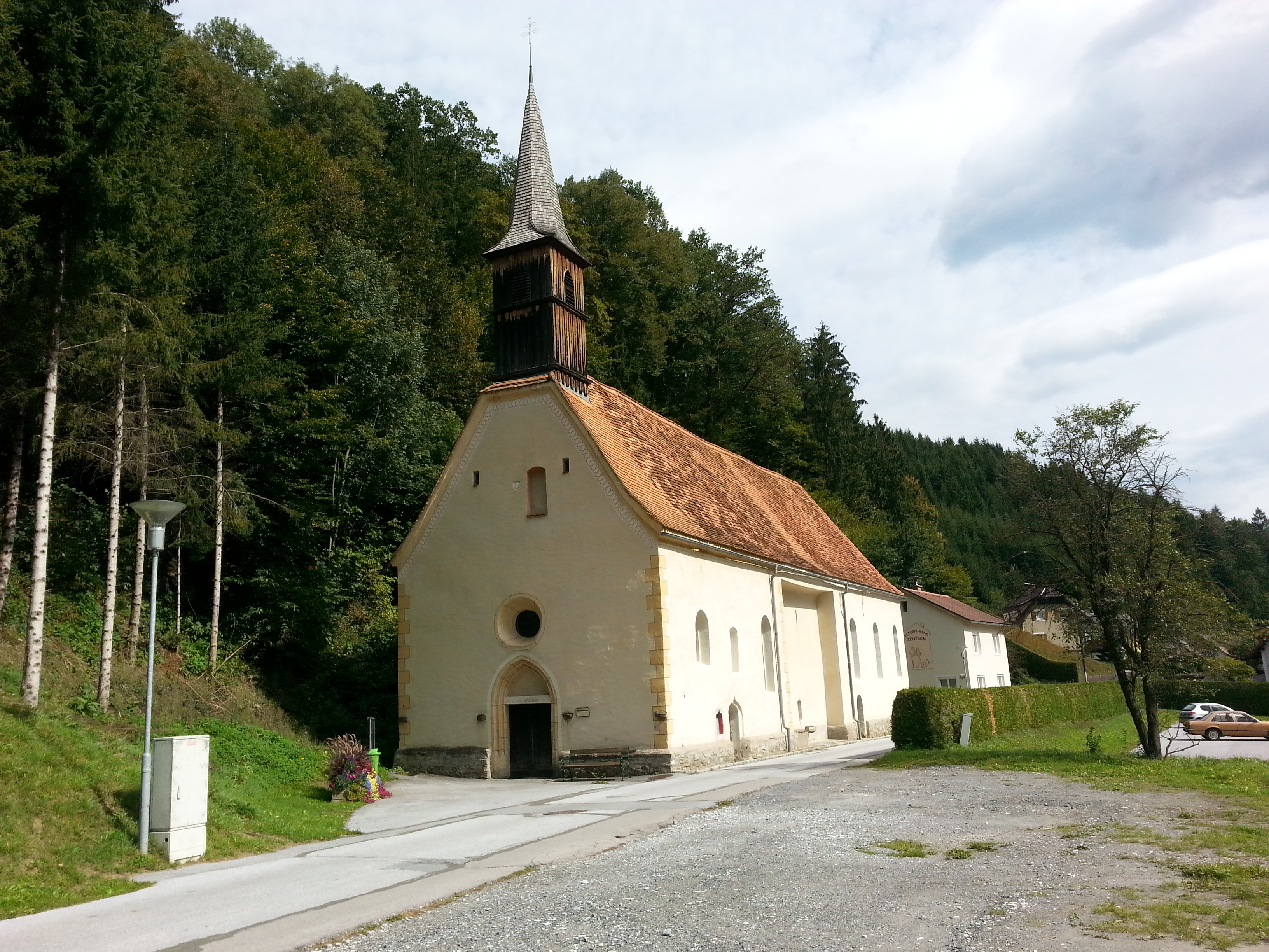 Kath. Filialkirche Hl. Blut